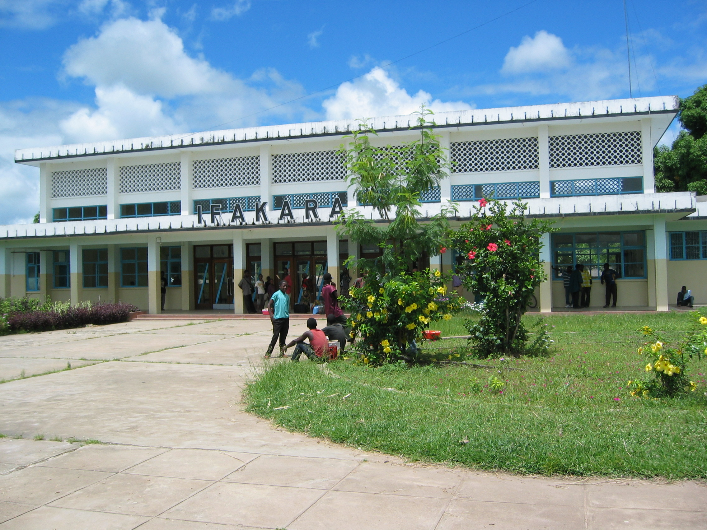 Tanzania-Zambia-Railway. Train station in Ifakara.